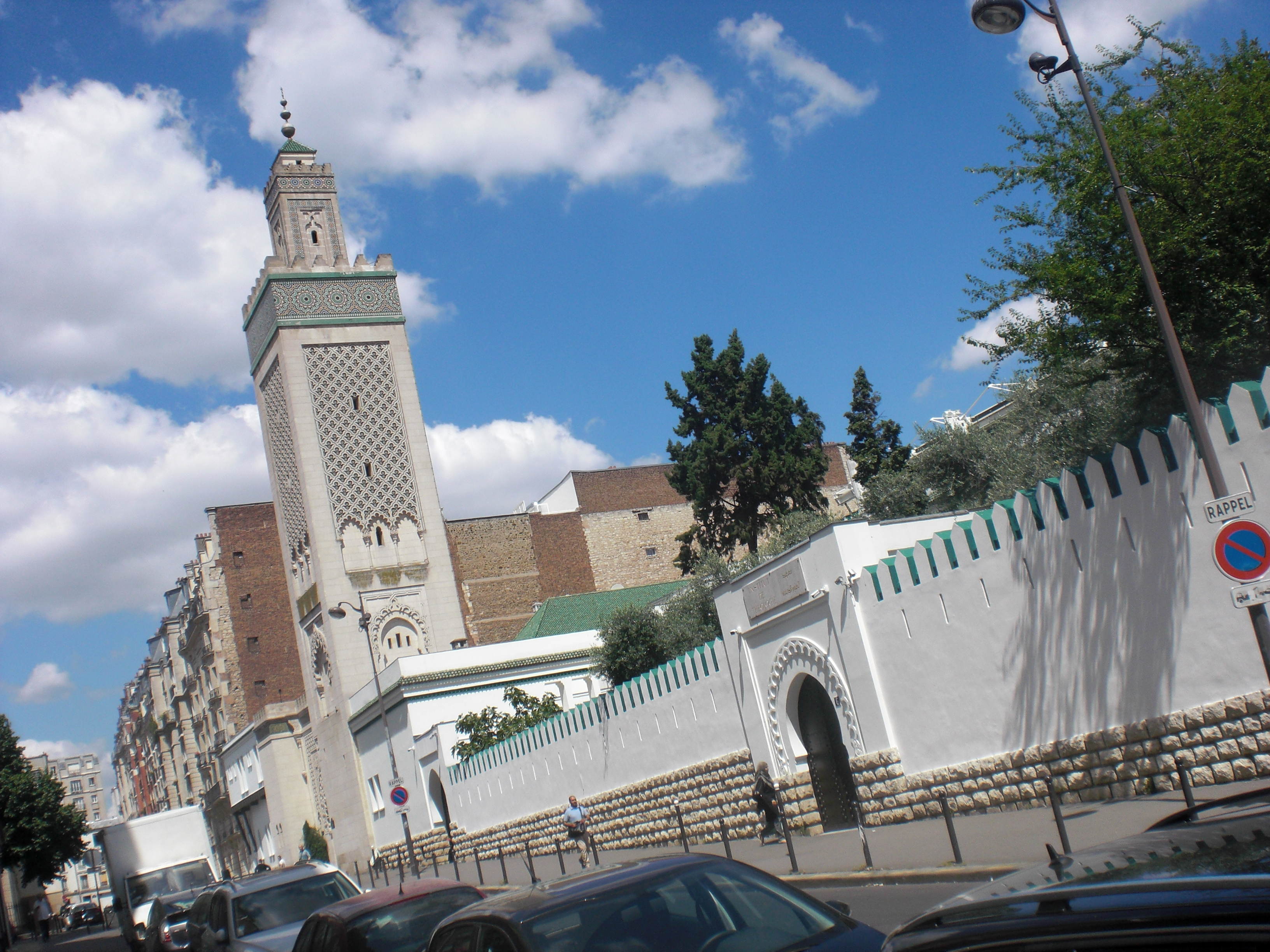 Minareto en moskeo de Parizo